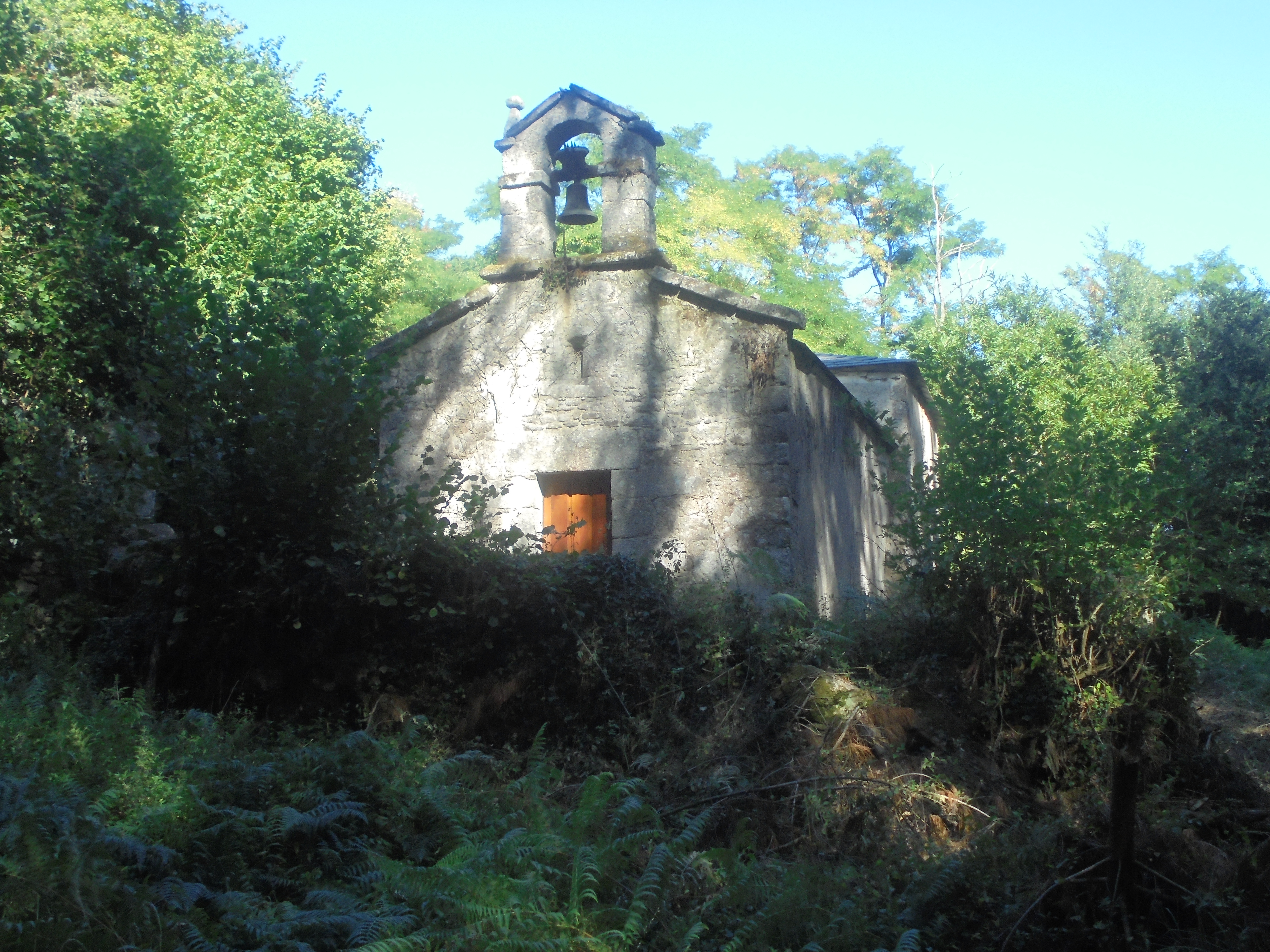 Igrexa parroquial de San Bartolomeu de Chamoso (O Corgo)